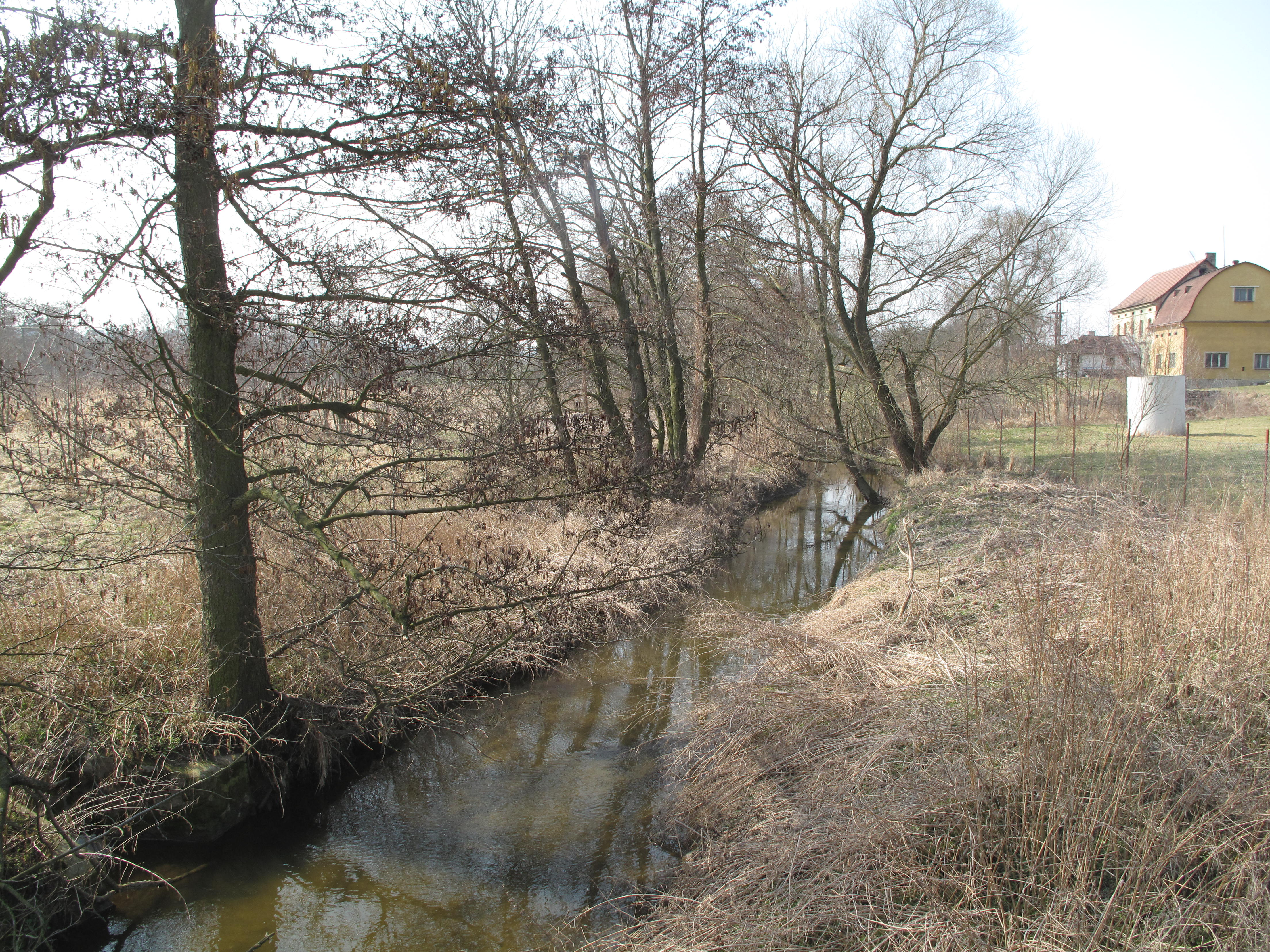 Oblast mezi sídly Tlustovousy a Úvaly, Výmola po soutoku s Tuklatským potokem